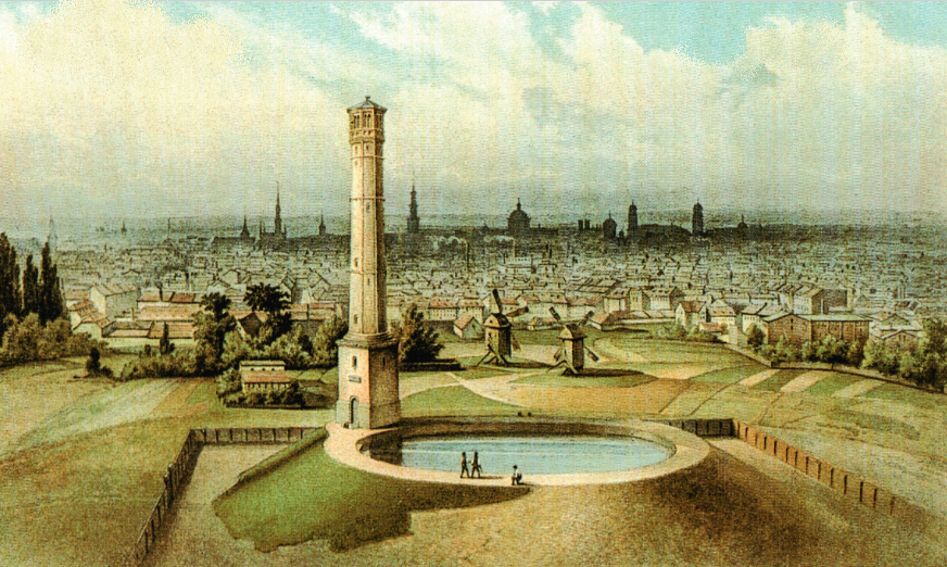 Hochbehälter auf dem Windmühlenberg, Zeichnung von Th. Dettmers 1856